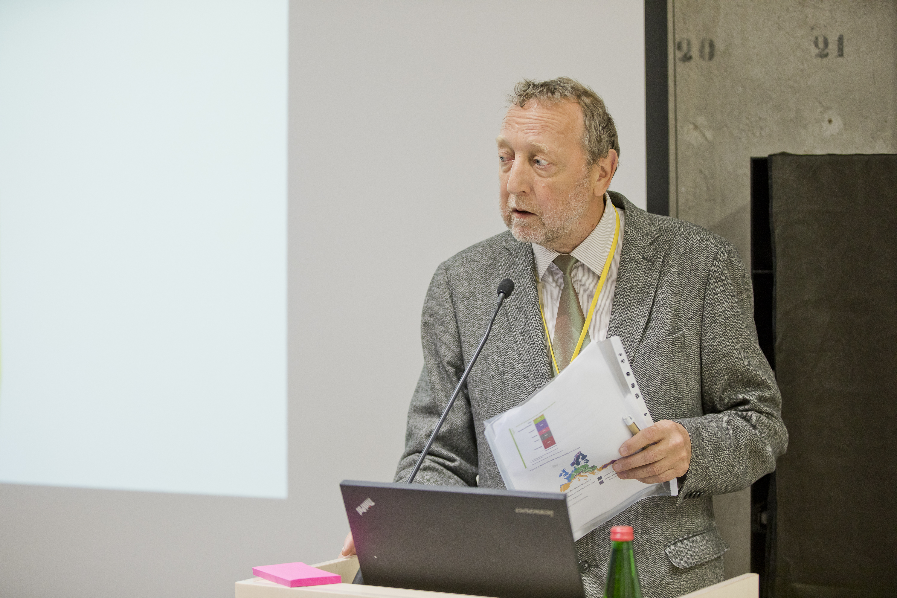 Valdur Lahtvee, Läänemeremaade Nõukogu sekretariaat. Euroopa Liidu Läänemere piirkonna strateegia foorum 2018, Tallinn